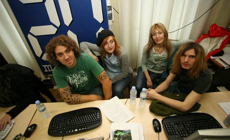 Dover en un encuentro digital en "20 minutos"